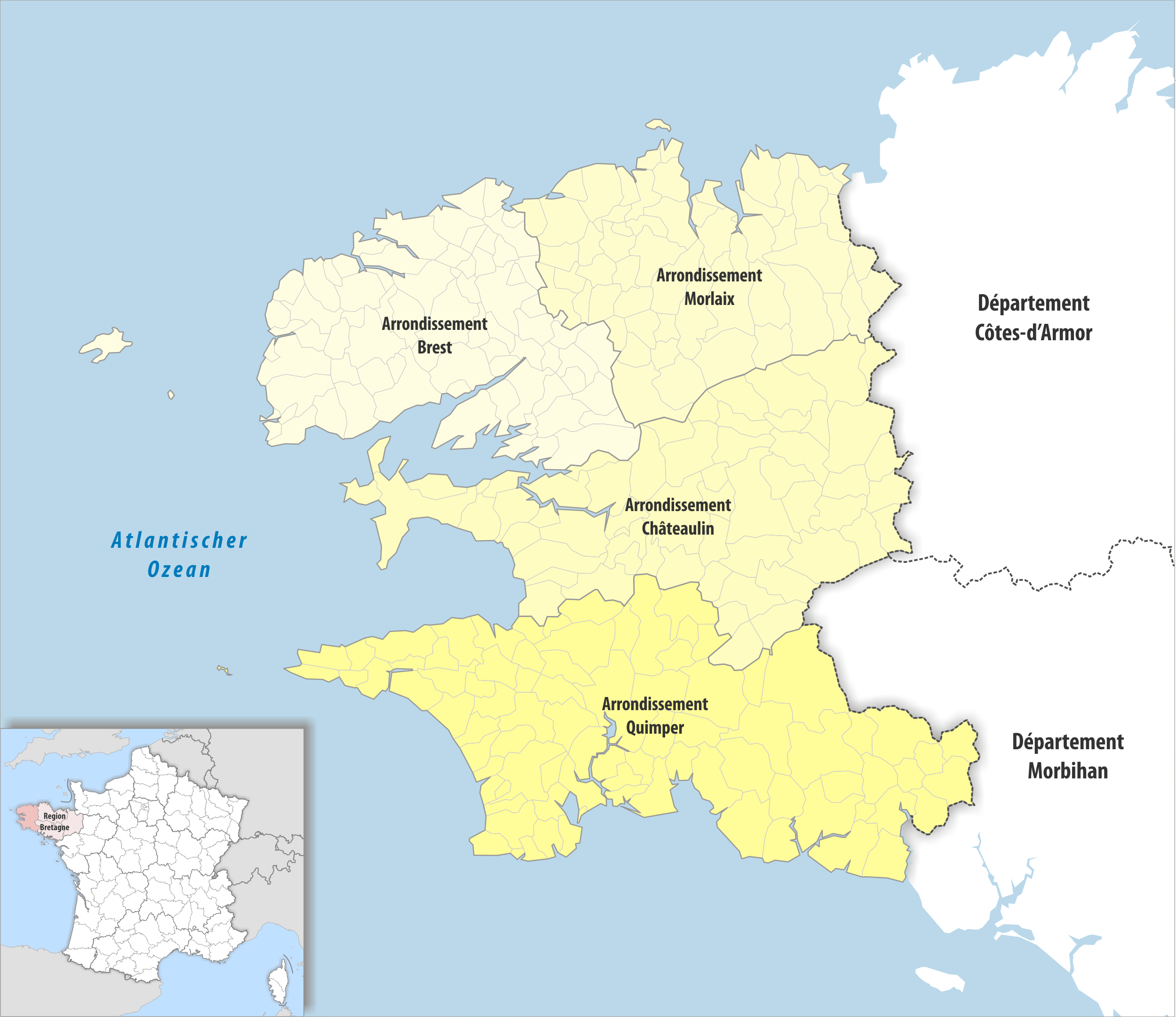 Gemeinden und Arrondissemente im Departement Finistère